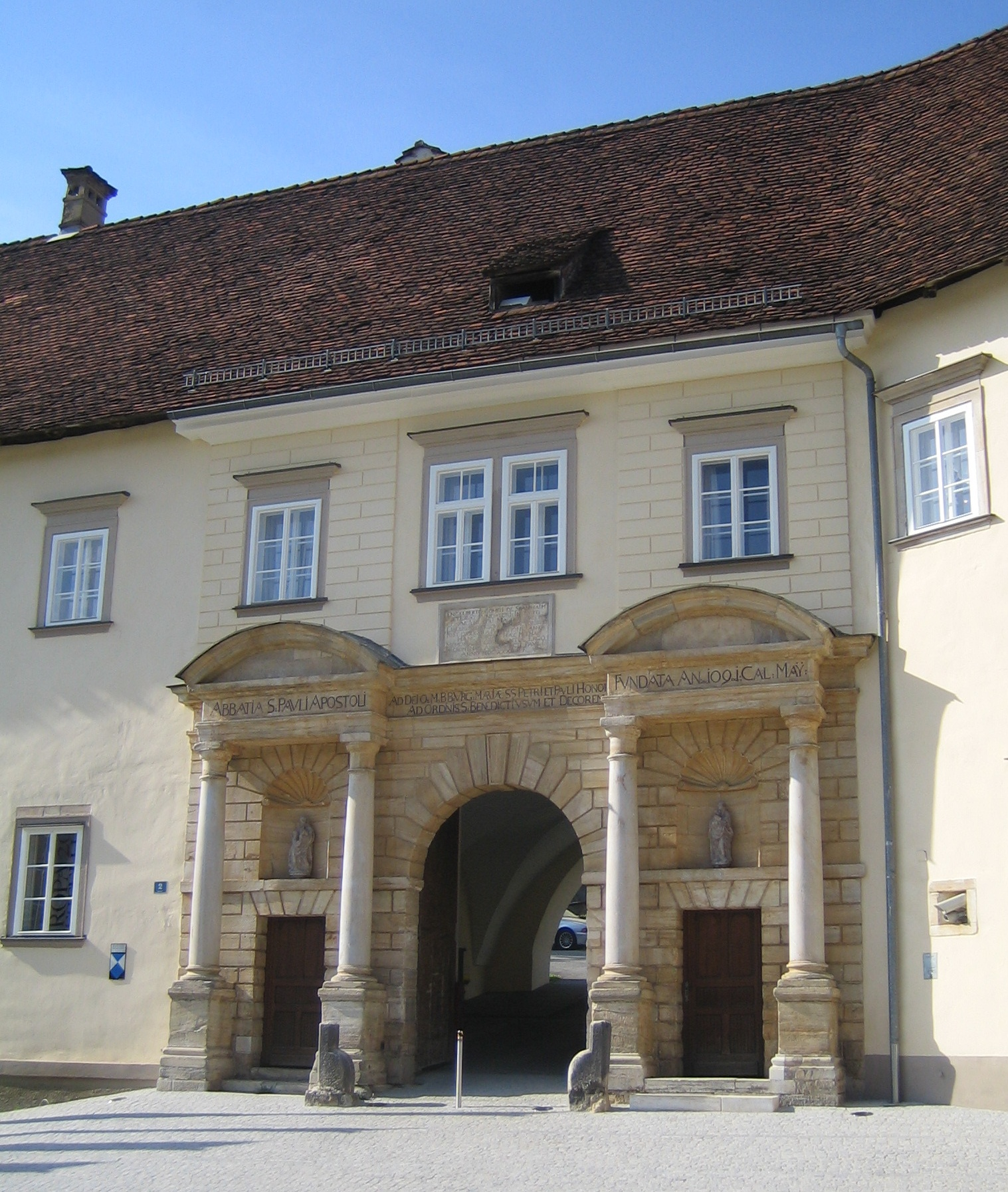 Hauptportal des Stifts St. Paul im Lavanttal